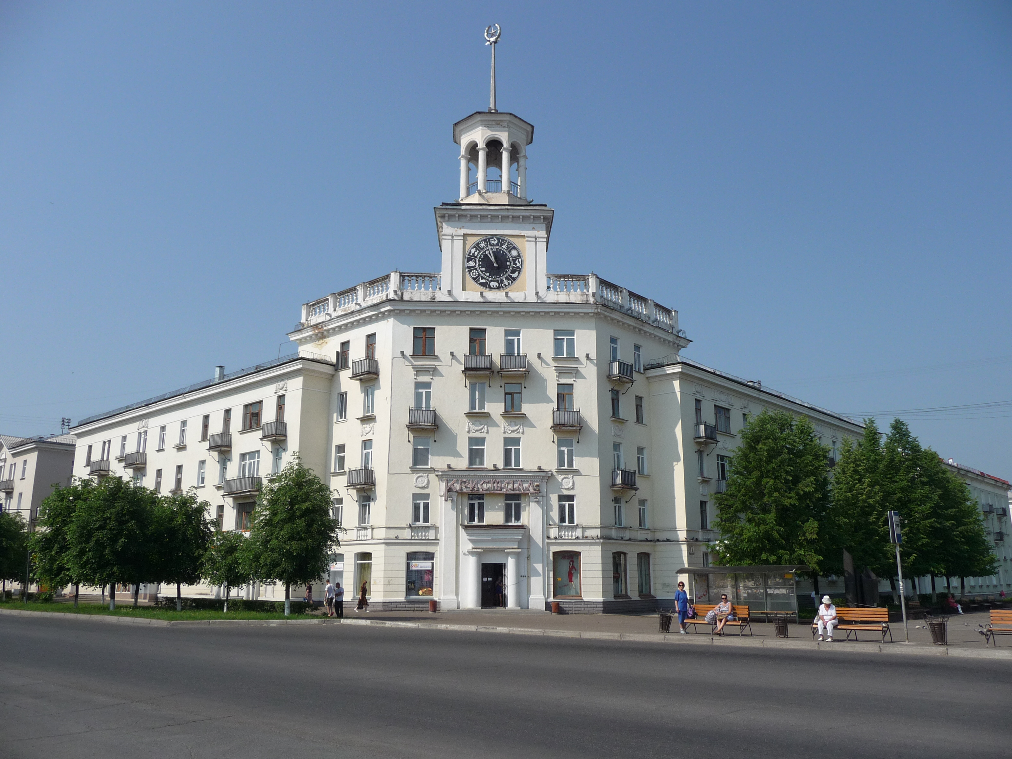 Clock tower in Zheleznogorsk, Krasnoyarsk Krai